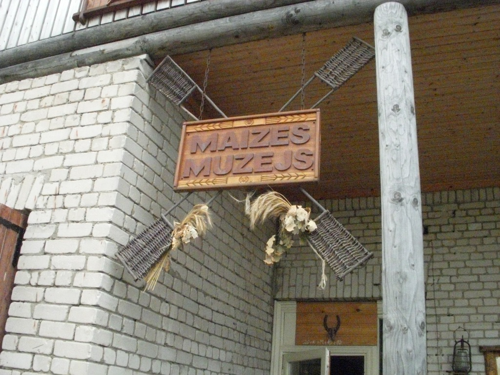 Aglonas maizes muzejs. 2011.g.15. augusts